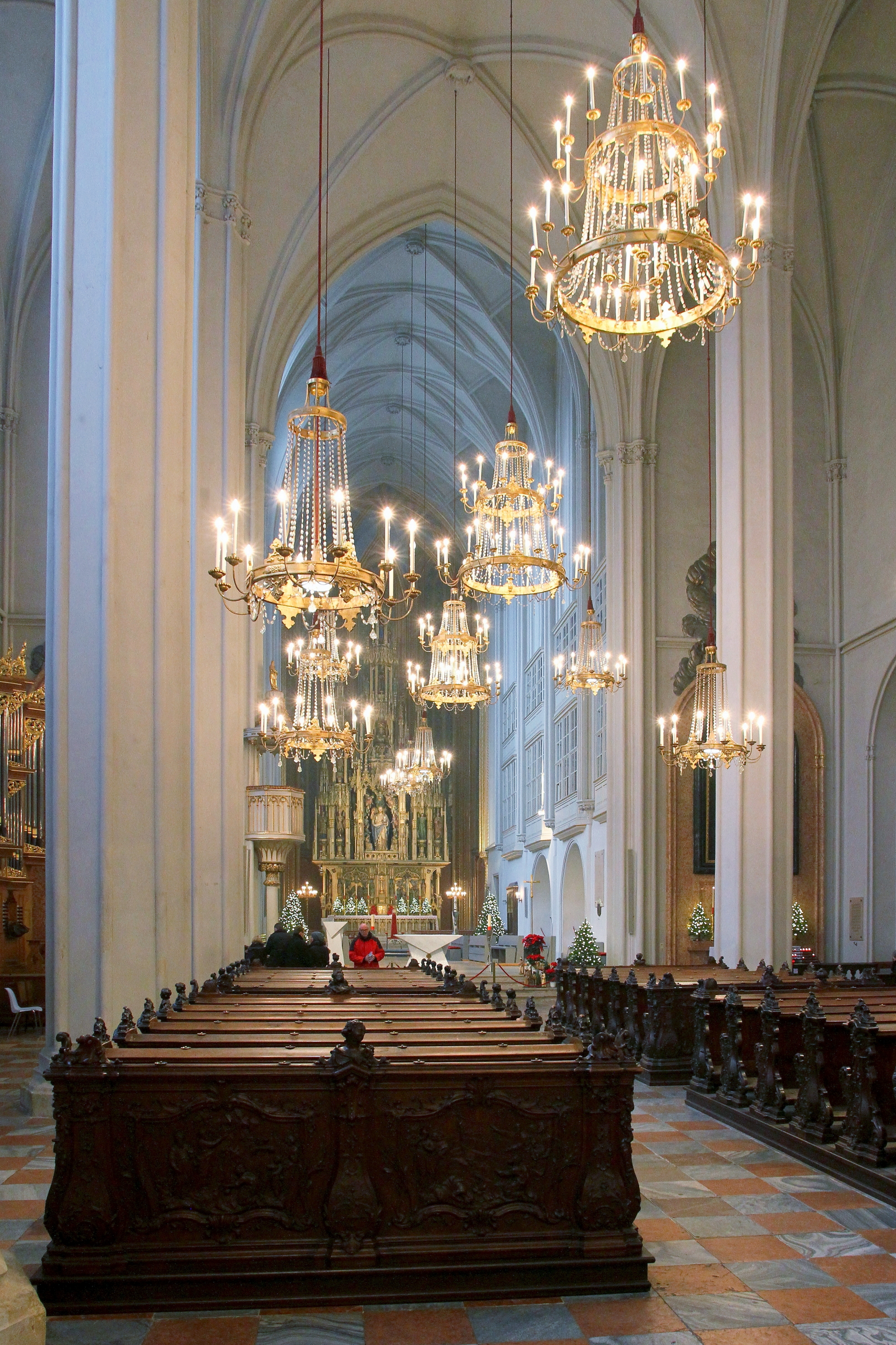 Innenansicht Richtung Hochaltar der Wiener Augustinerkirche.